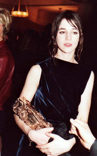 Charlotte Gainsbourg à la cérémonie des Césars.